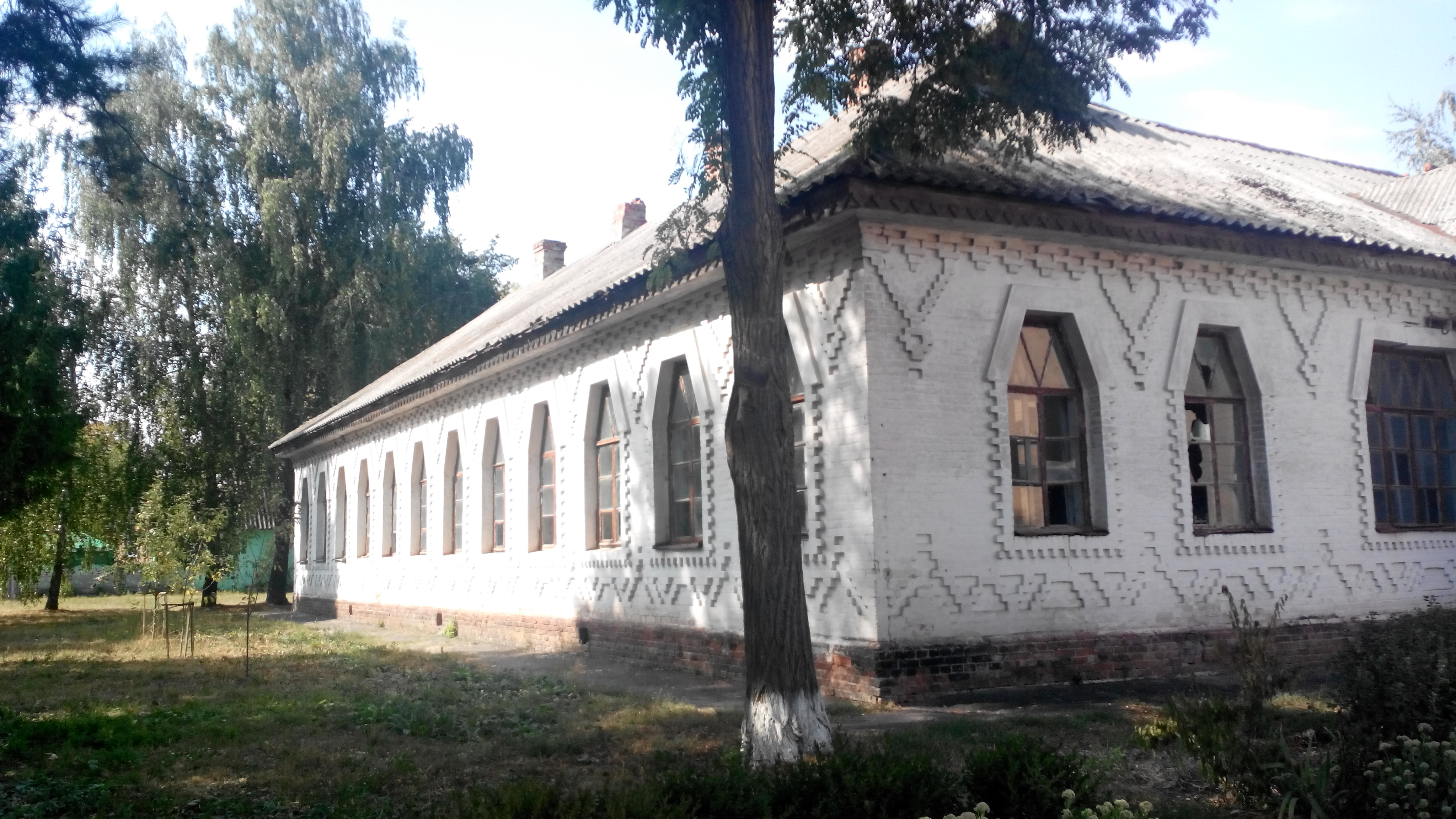 Школа земська трикомплектна, село Білогорілка, вул. Молодіжна, 30